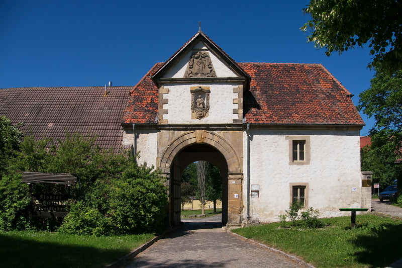 Torhaus (von außen) Tagungszentrum Kloster Hedersleben